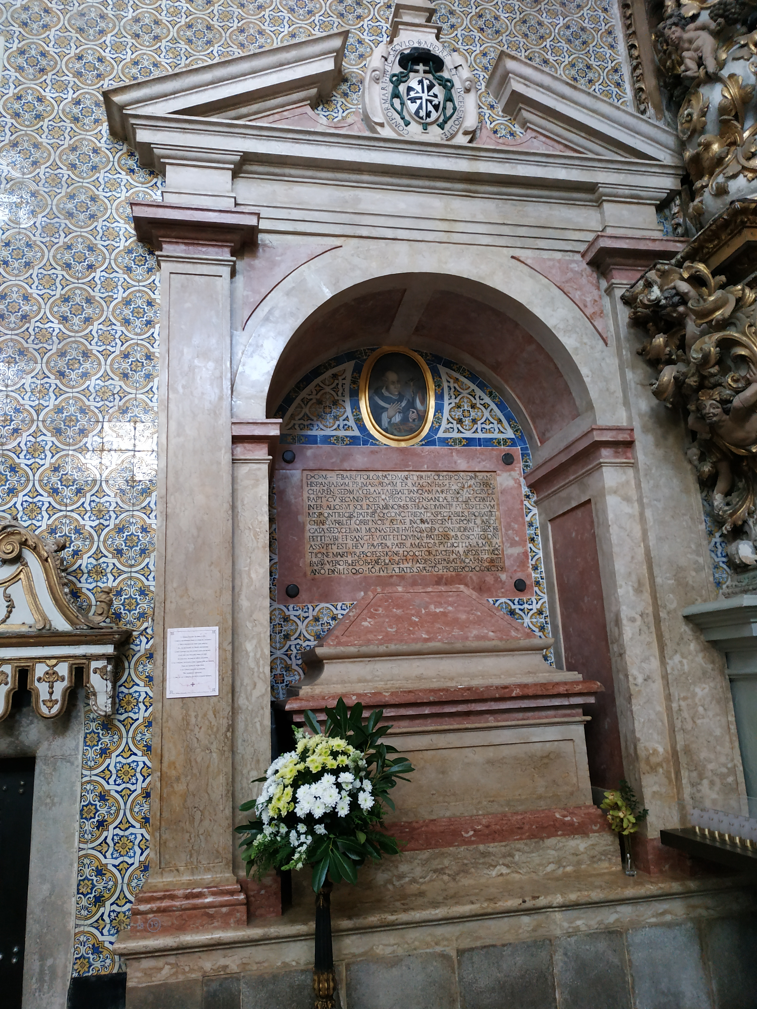 Viana do Castelo City Portugal